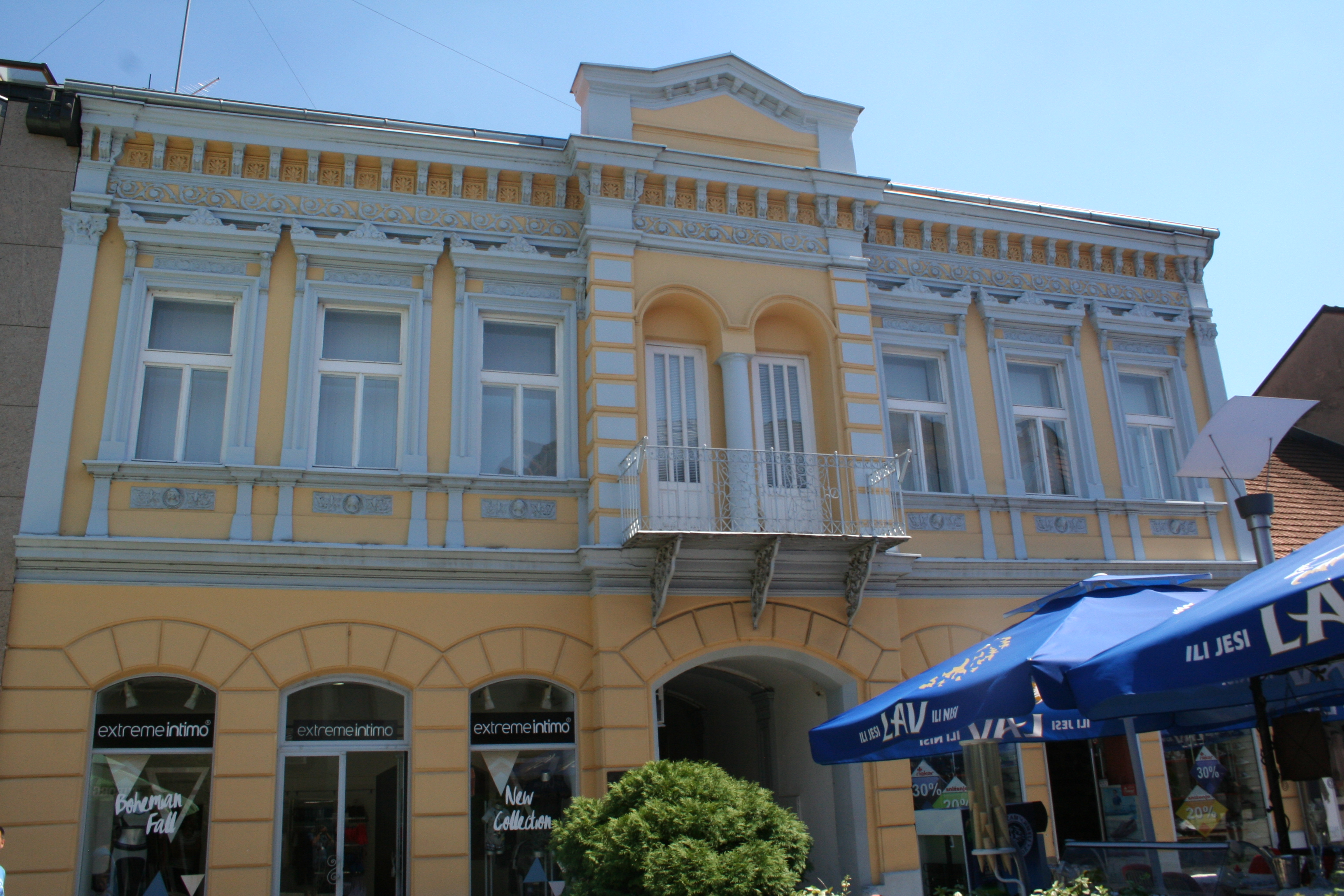 Kuća Katića sa galerijom Miće Popovića, Loznica